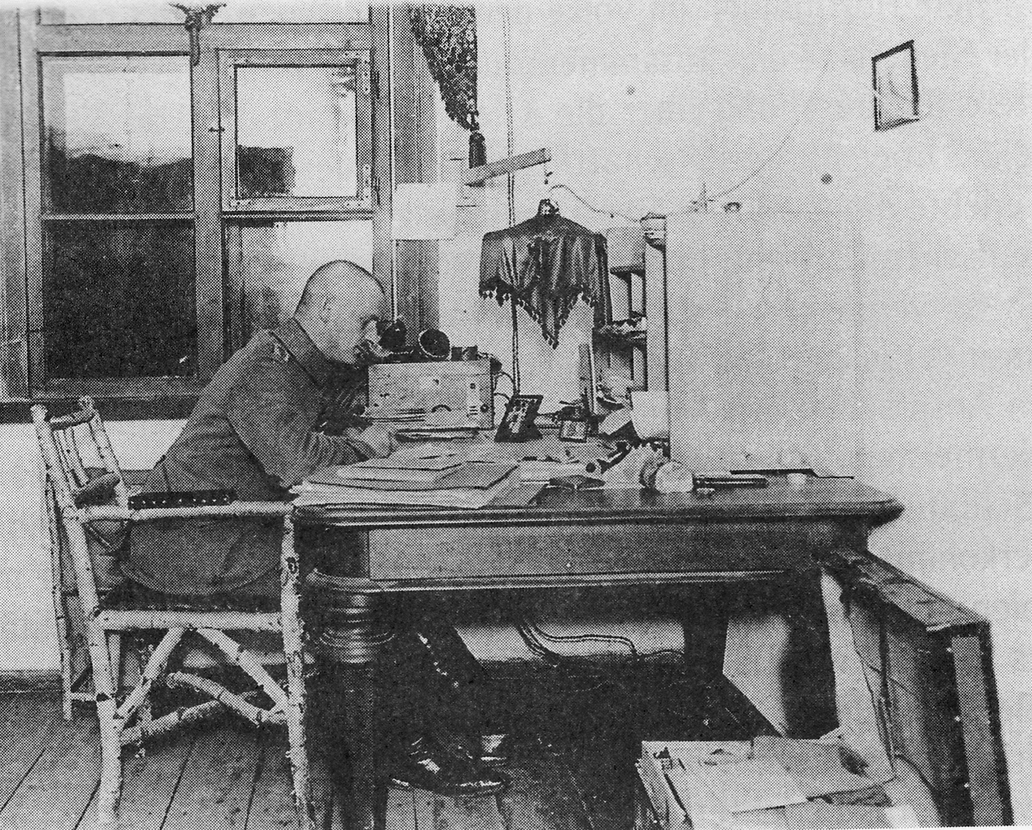 Carl Friedrich Goerdeler als Ordonnanzoffizier im Ersten Weltkrieg in Weißrussland.